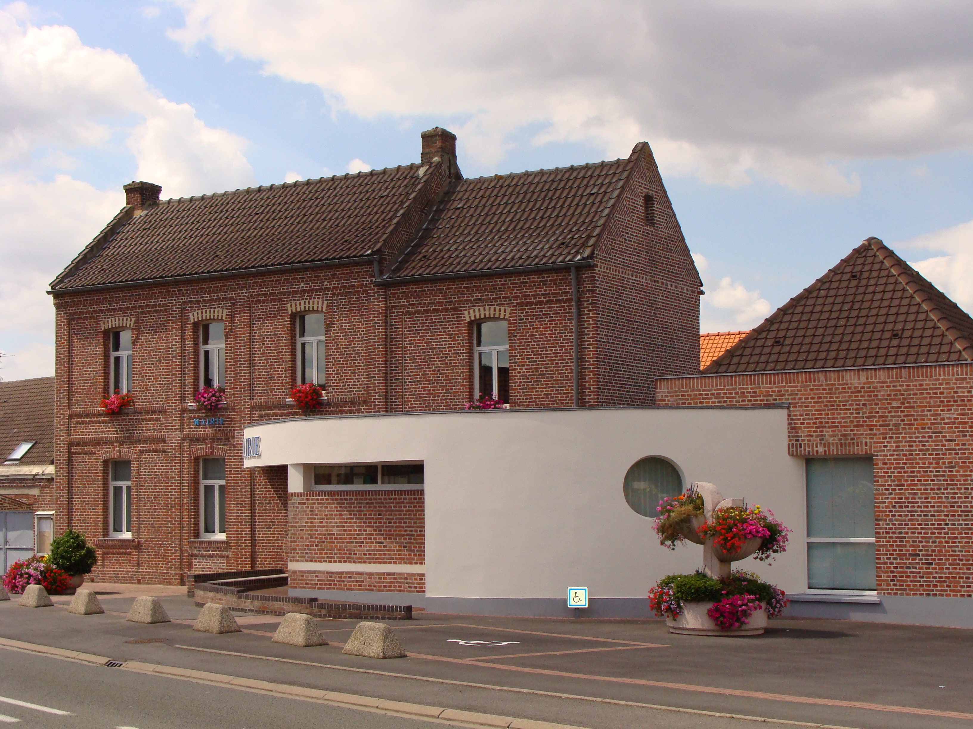 Mairie de Loffre département du Nord Franec